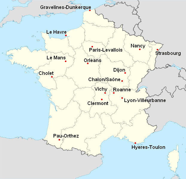 Clubs participants à la Pro A 2007-2008